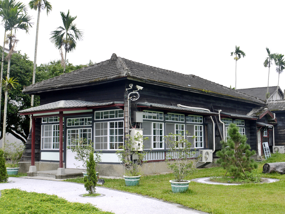 花蓮糖廠日本建築群